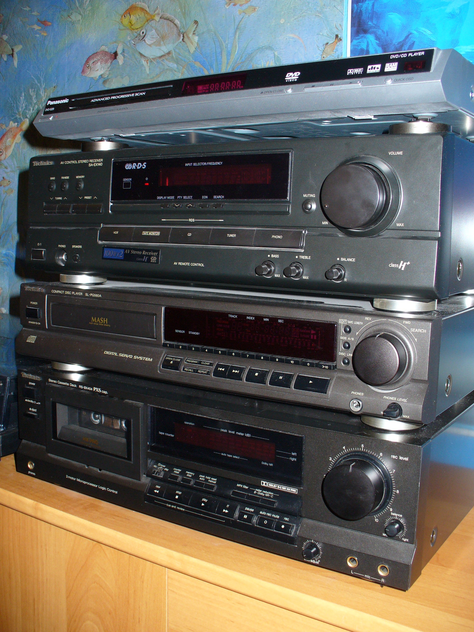 Wieża Technicsa składająca się z decka, odtwarzacza cd, amplitunera oraz odtwarzacza DVD Panasonica.